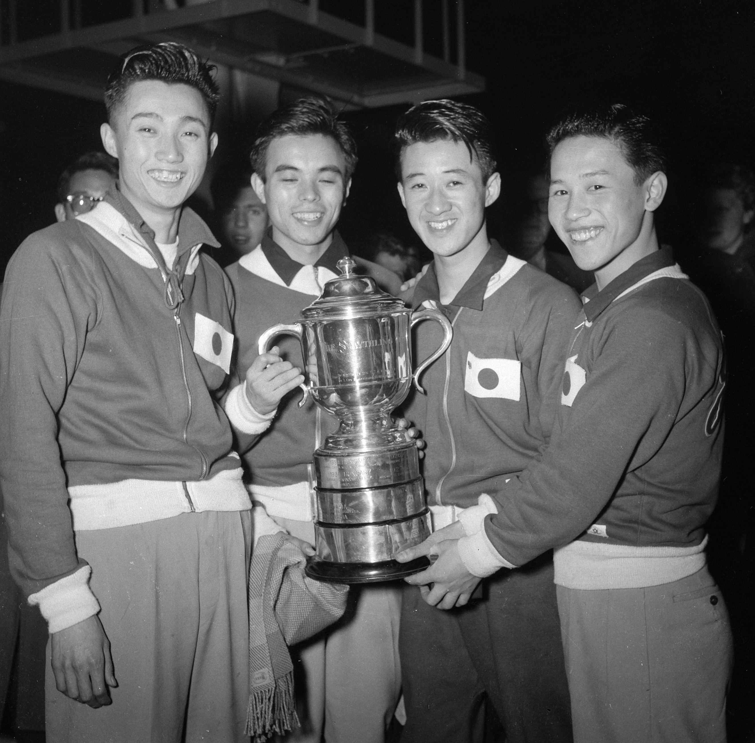 Tafeltennis Utrecht Japanse herenploeg